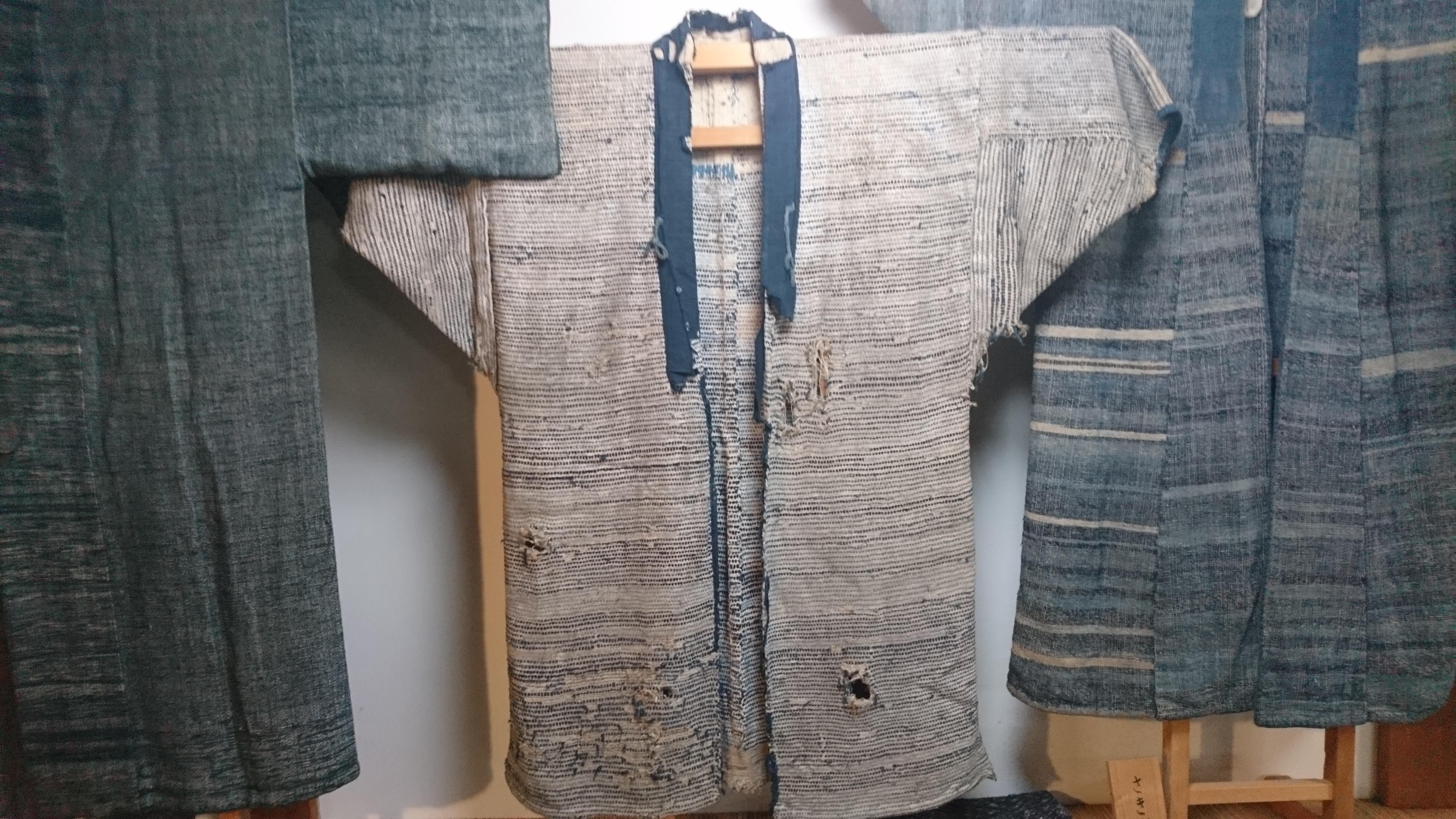 経糸に藤糸を用いた裂き織（原始布古代織参考館所蔵）